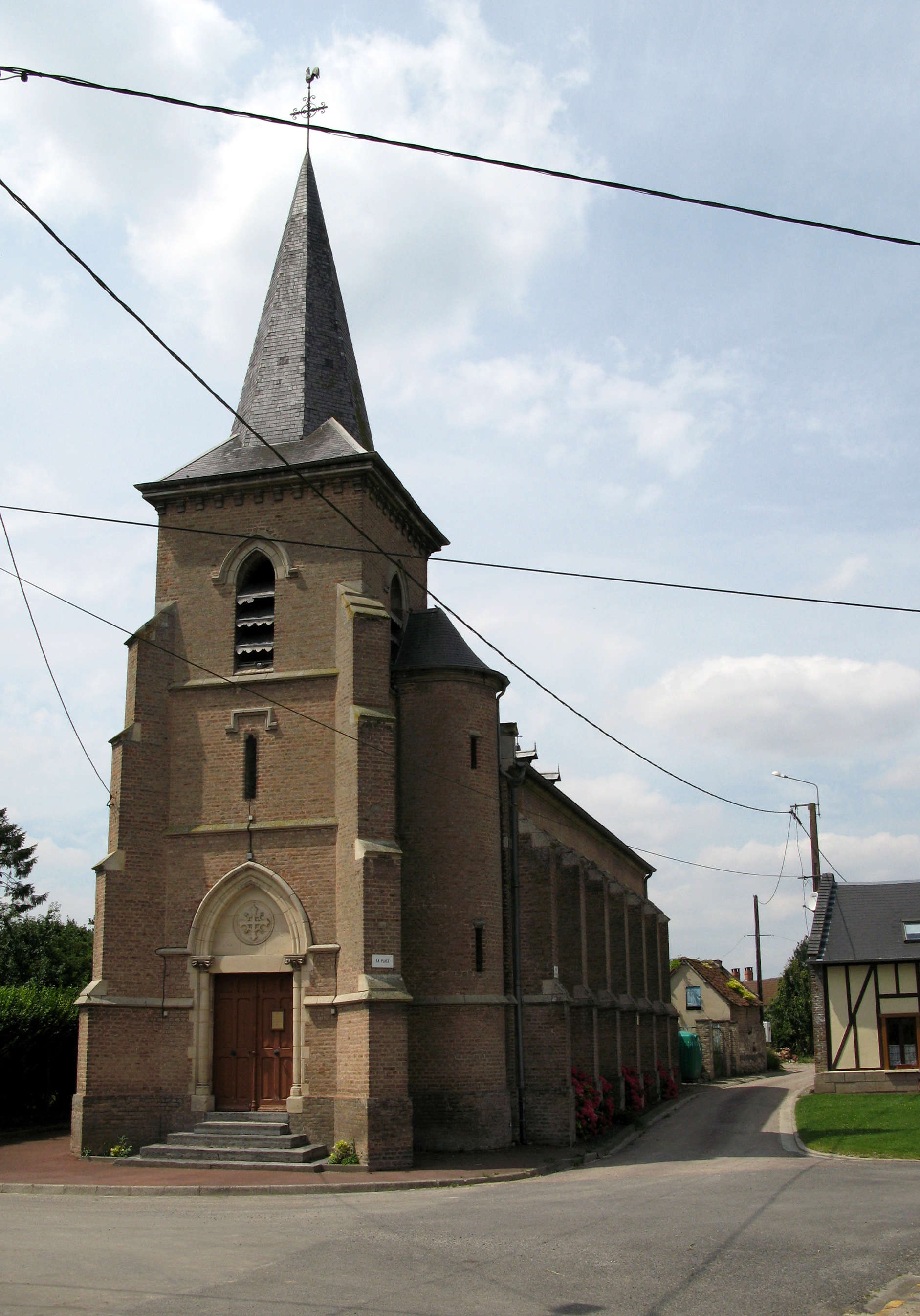 Crouy-Saint-Pierre (Somme, France) - L'église Saint-Firmin, avec son réseau de fils électriques aériens. .